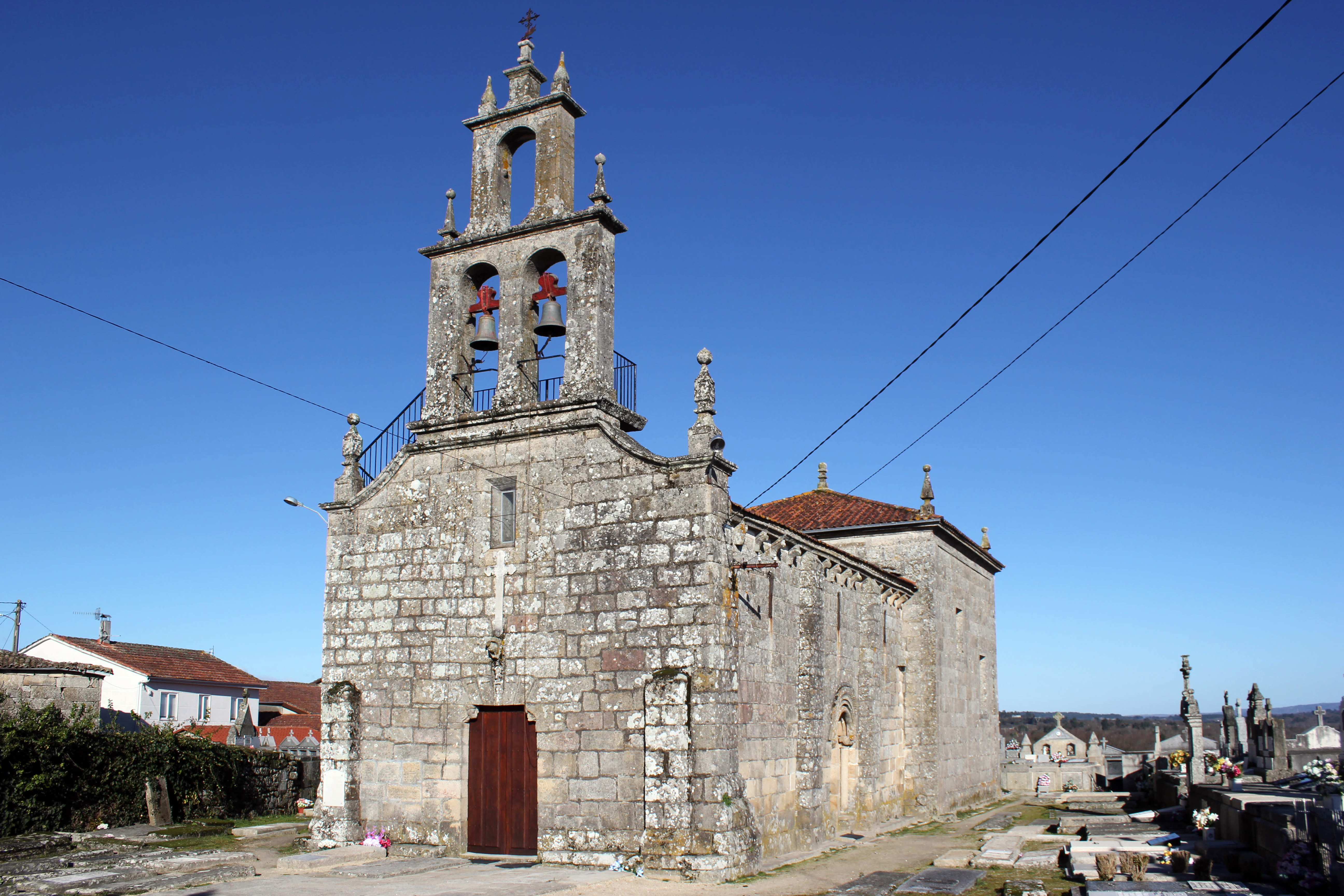 Igrexa de Santa María de Amoeiro, no concello da Amoeiro